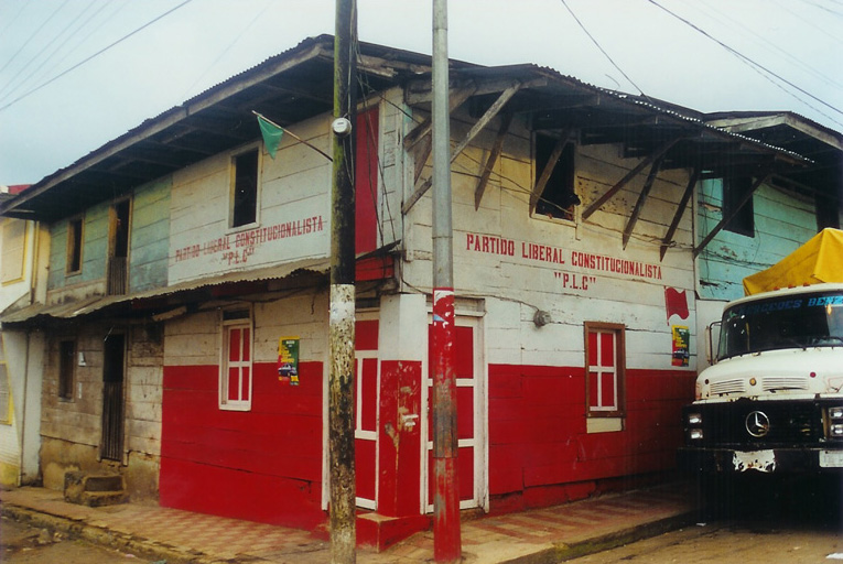 A Partido Liberal Nacional párt irodája San Carlosban (Nicaragua)